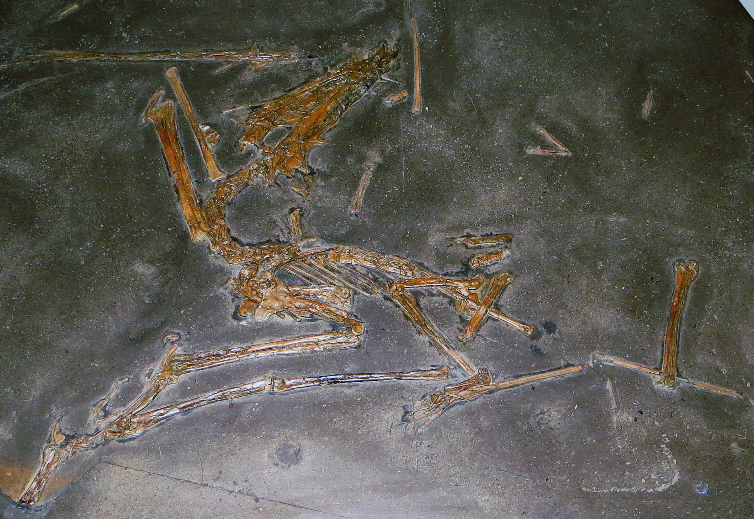 Specimen GPIT 1645/1, a fossil of Dorygnathus, an extinct reptile - Took the picture at Museum of Paleontology, Tuebingen